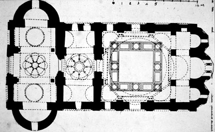 16. Khios, Nea Moni kolostor katholikonja, 9–11. sz., alaprajz